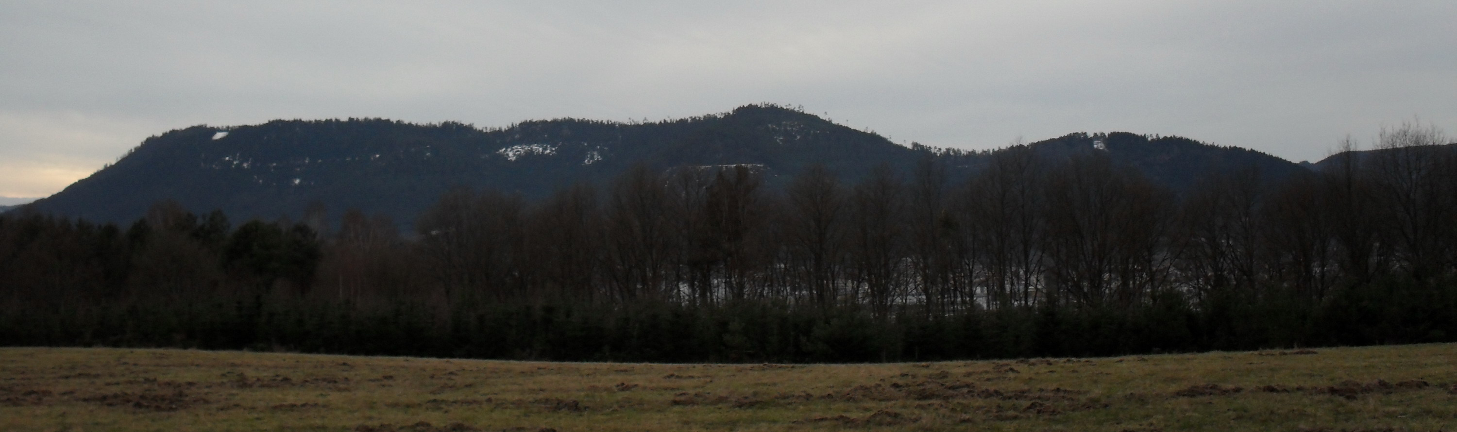 Aperçu depuis le bas des Hautes Fosses du massif du Kemberg (au dessus de la confluence Meurthe-Fave cachée). Photo numérique tronquée en bandeau et réduite